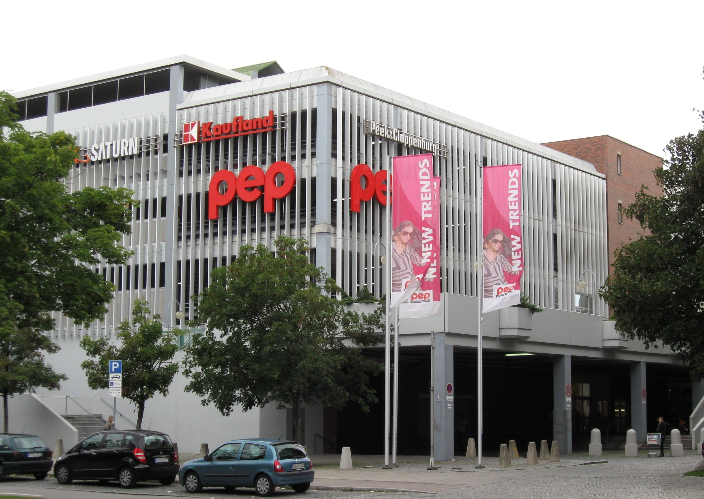 Perlach-Einkaufs-Center pep, Thomas-Dehler-Str., München-Neuperlach